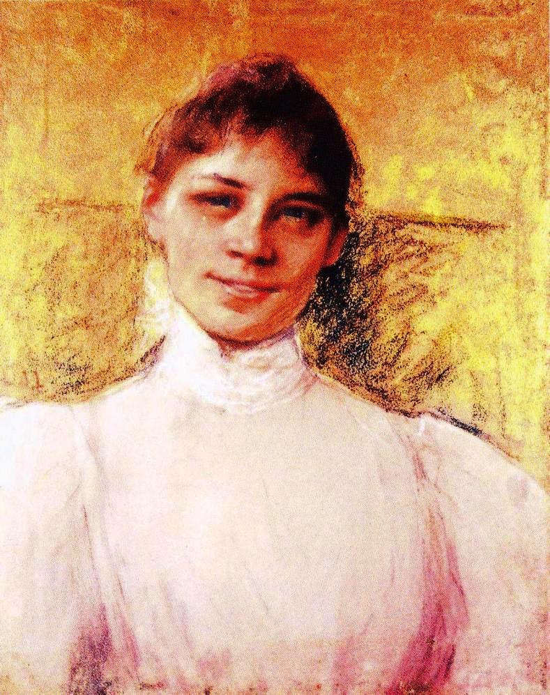 Näyttelijä Ida Aalberg.